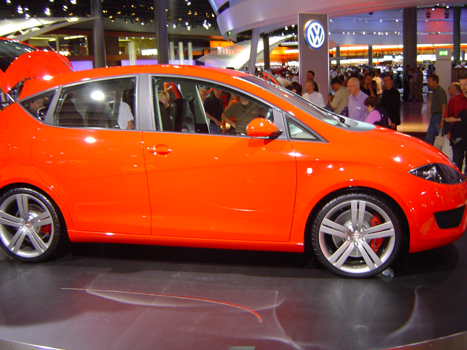 IAA_2003_094